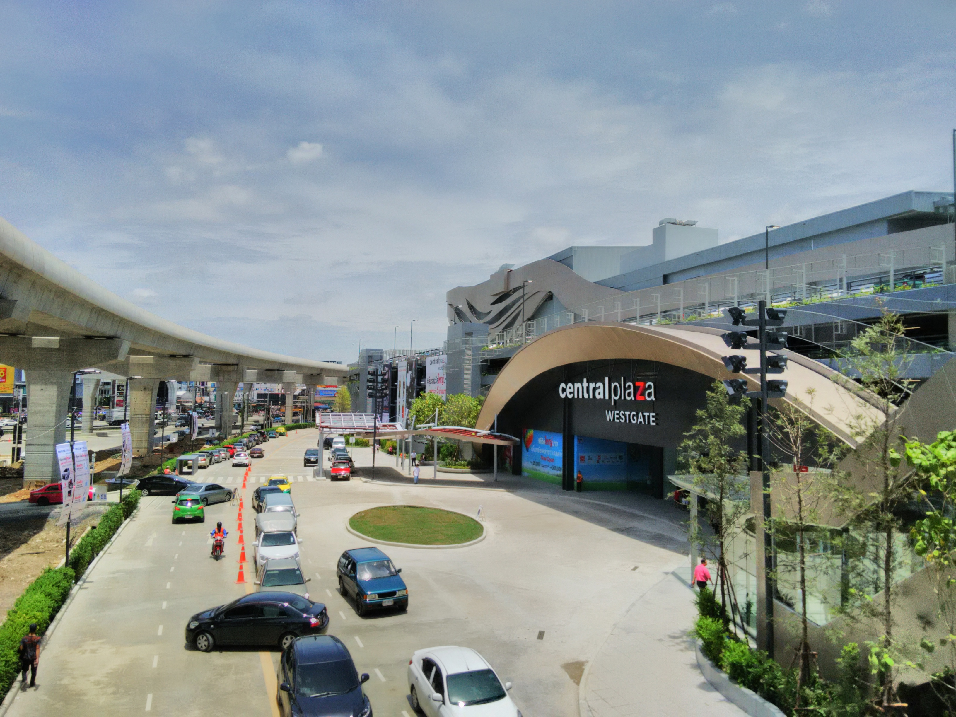 ด้านหน้าศูนย์การค้า CentralPlaza WestGate ฝั่งโค้งถนนรัตนาธิเบศร์ ซึ่งมีลานจอดรถส่วนหน้าและทางเข้าสู่ศูนย์การค้าที่บริเวณชั้น 1 ถ่ายเมื่อวันอาทิตย์ที่ 30 สิงหาคม 2558 เวลา 12.00 น.